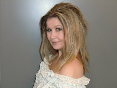 Anki Nilsson